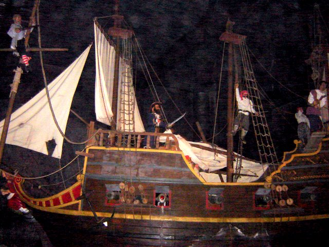 Attaque du bateau de l'attraction Los Piratas